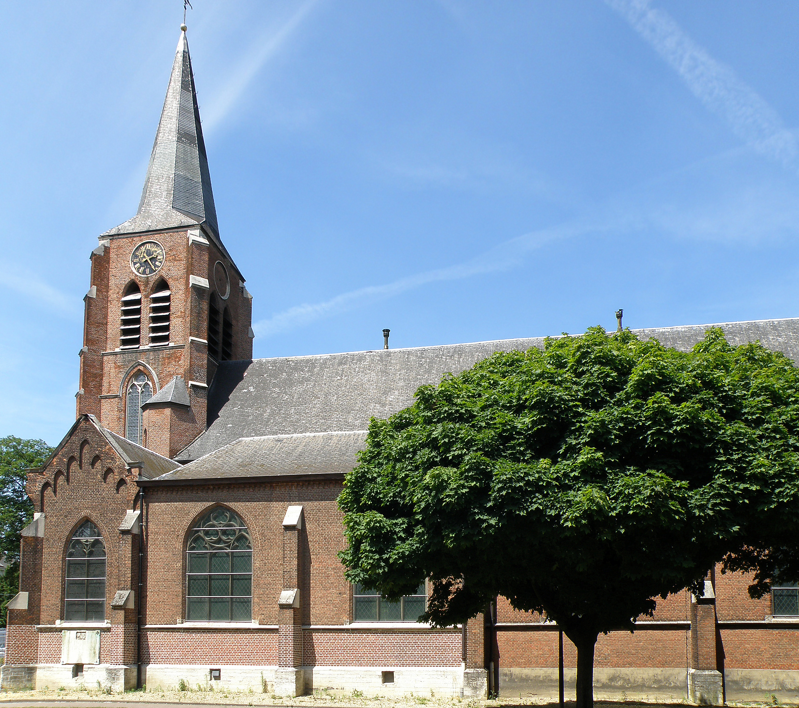 Antwerpen, district Hoboken (België). Onze-Lieve-Vrouw Geboortekerk.